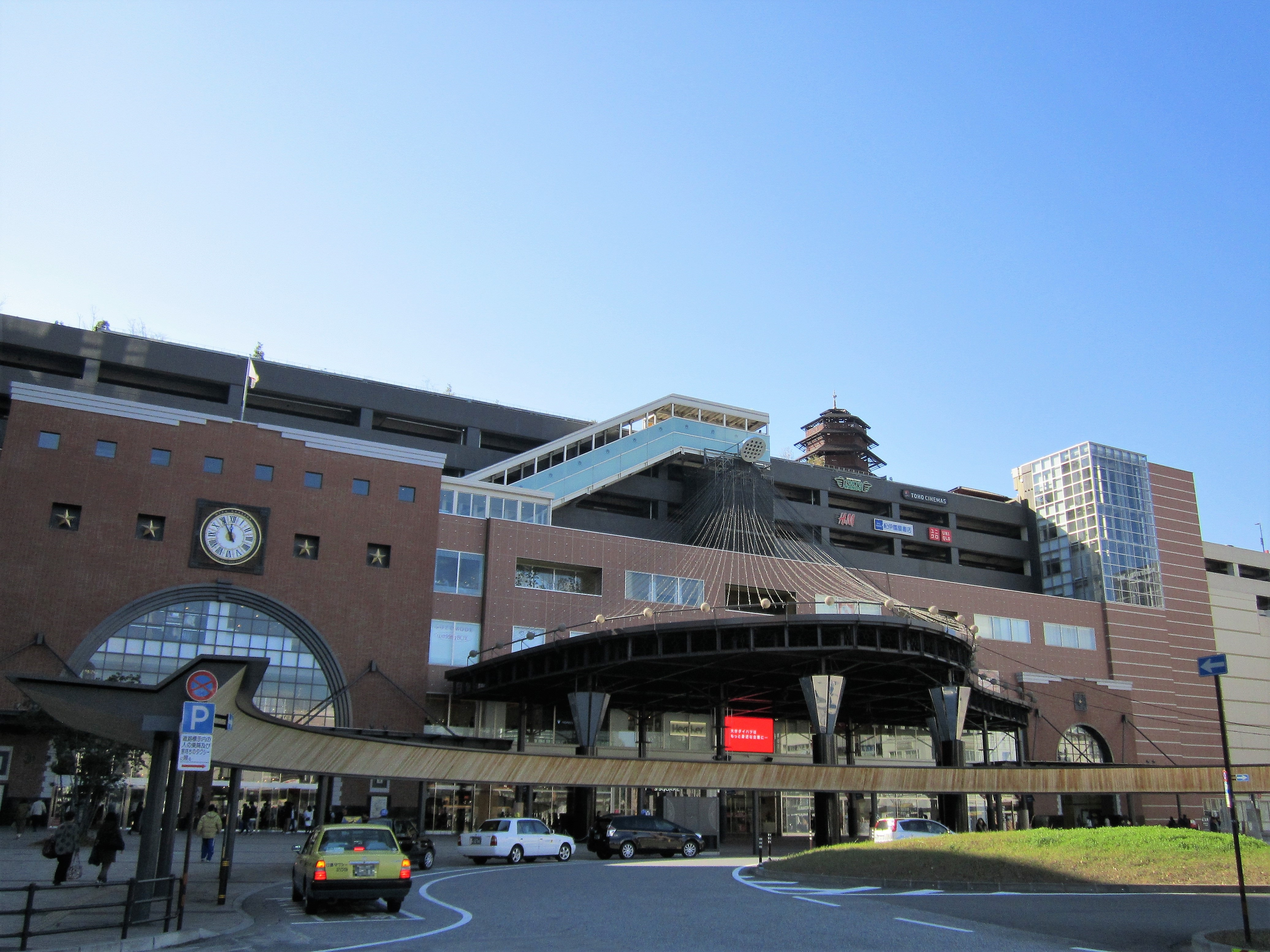 大分駅ビル アミュプラザおおいた Canon PowerShot A2200